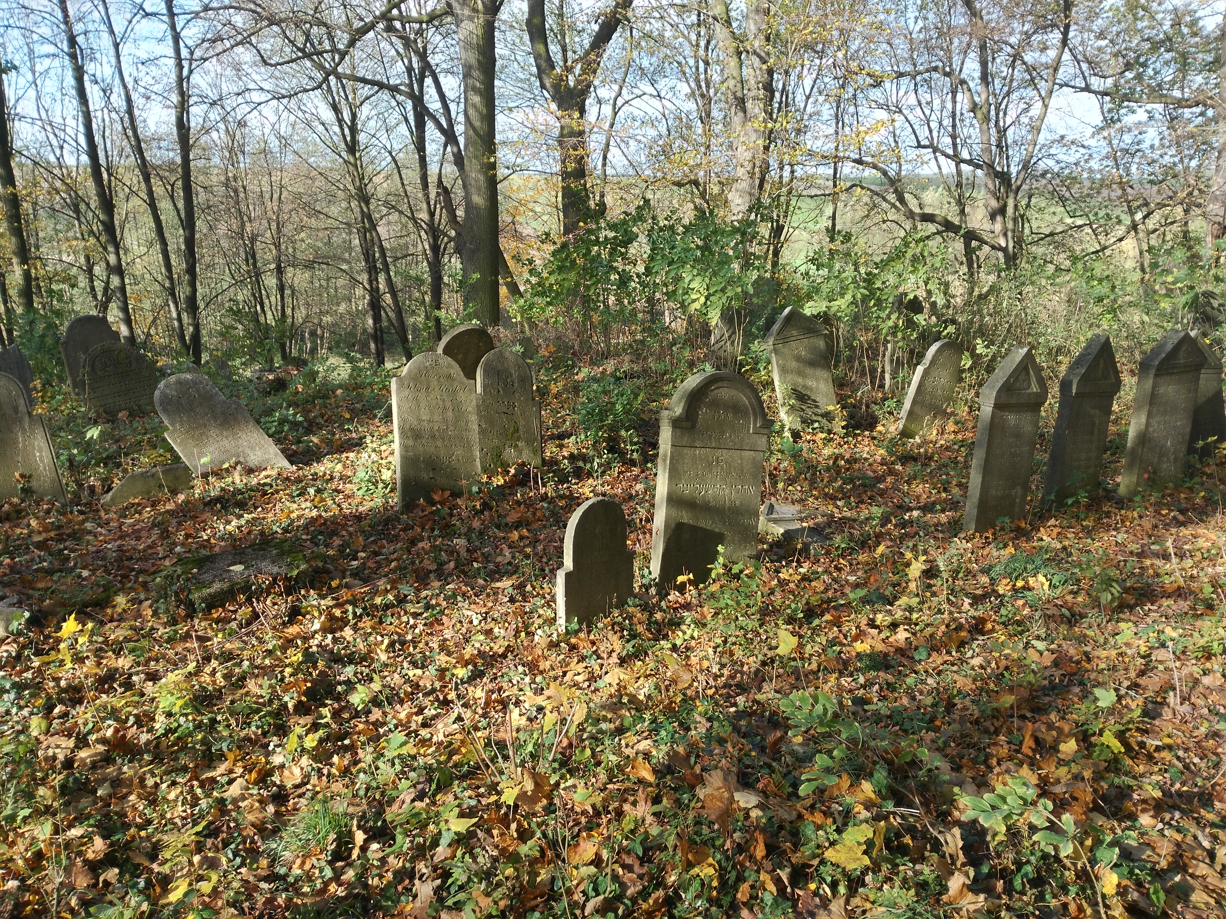 Biała, Cmentarz żydowski w Białej Wikidata has entry Q8511161 with data related to this item.